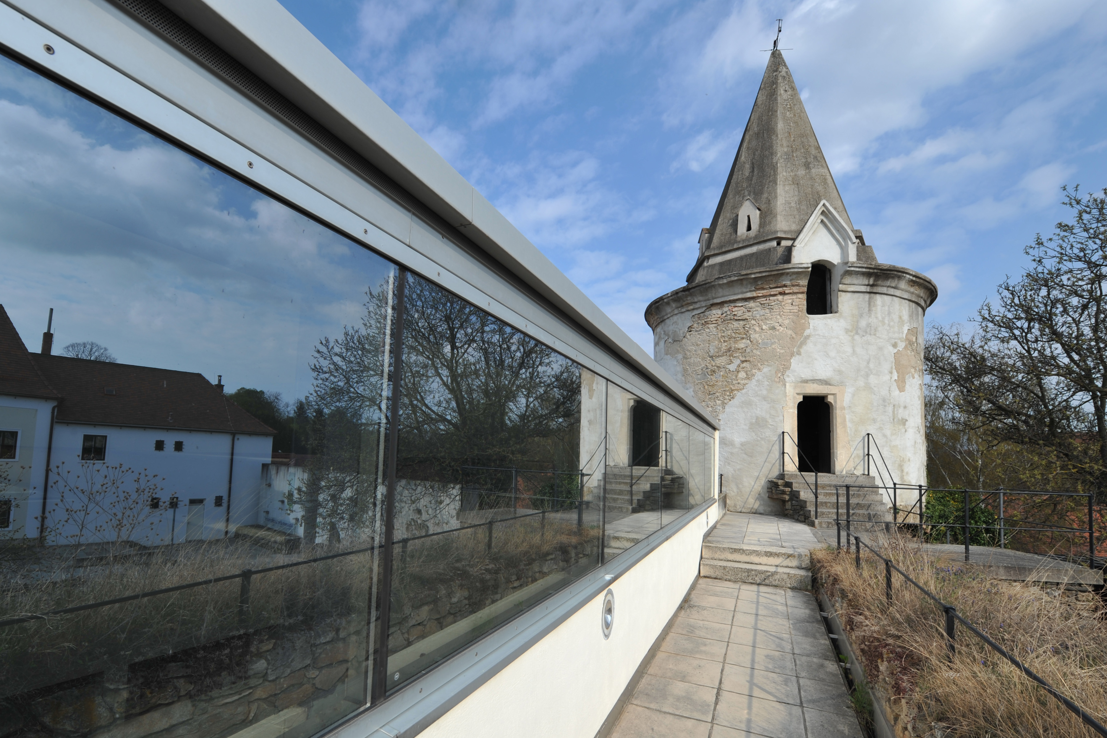 Höbarthmuseum/ ehem. Bürgerspital und Kapelle